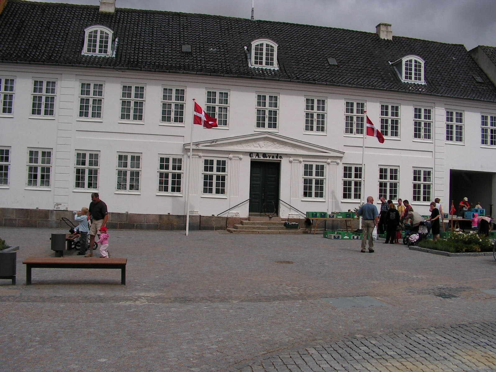 Maribo. Fot. Artur Wójtowicz